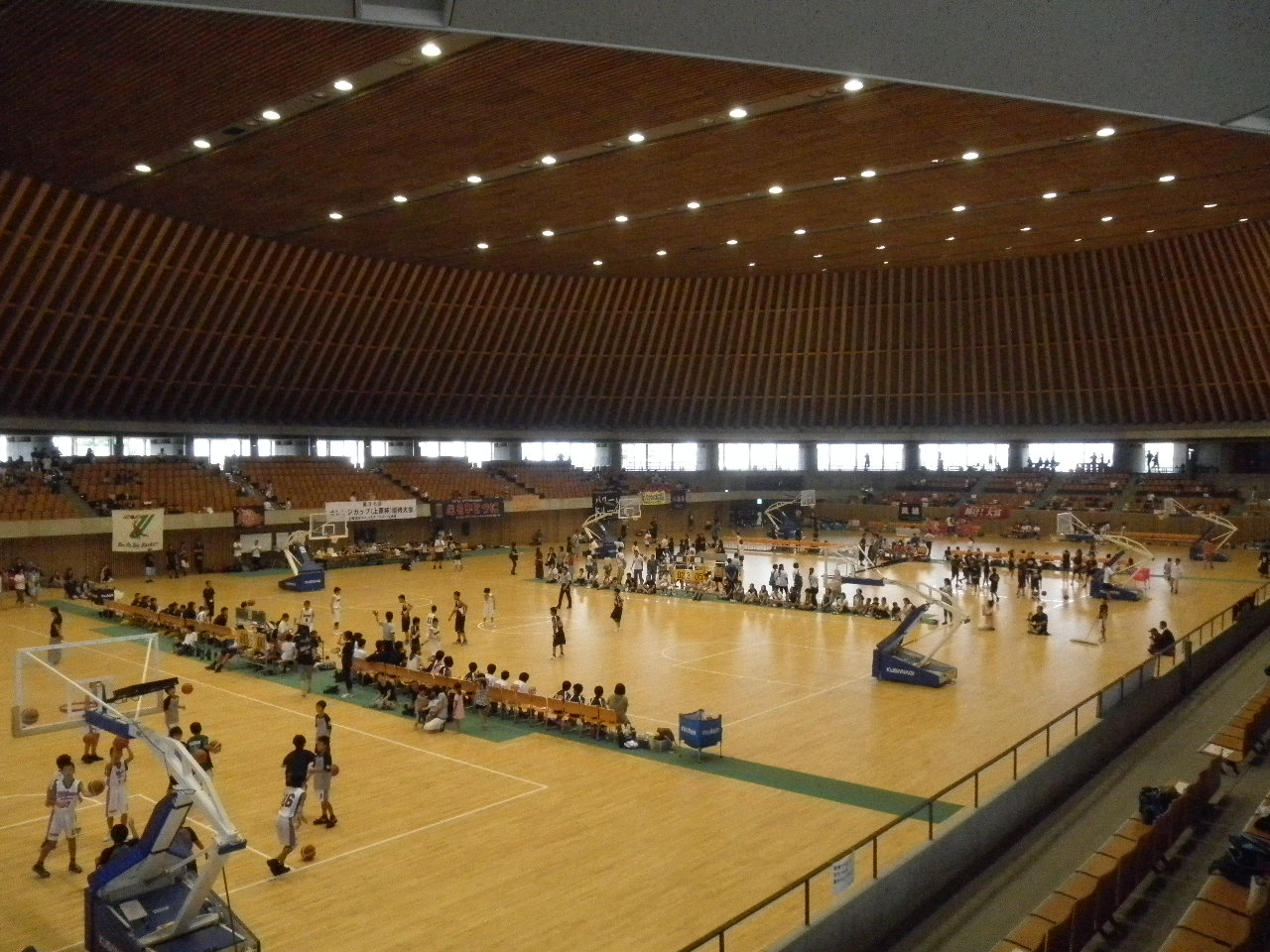 静岡県草薙総合運動場新体育館（このはなアリーナ）のアリーナ部